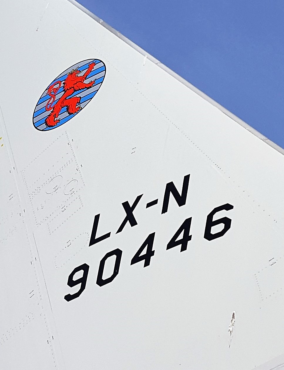 AWACS Boeing E-3 in Geilenkirchen. Leitwerk mit Luxemburger Kennung.